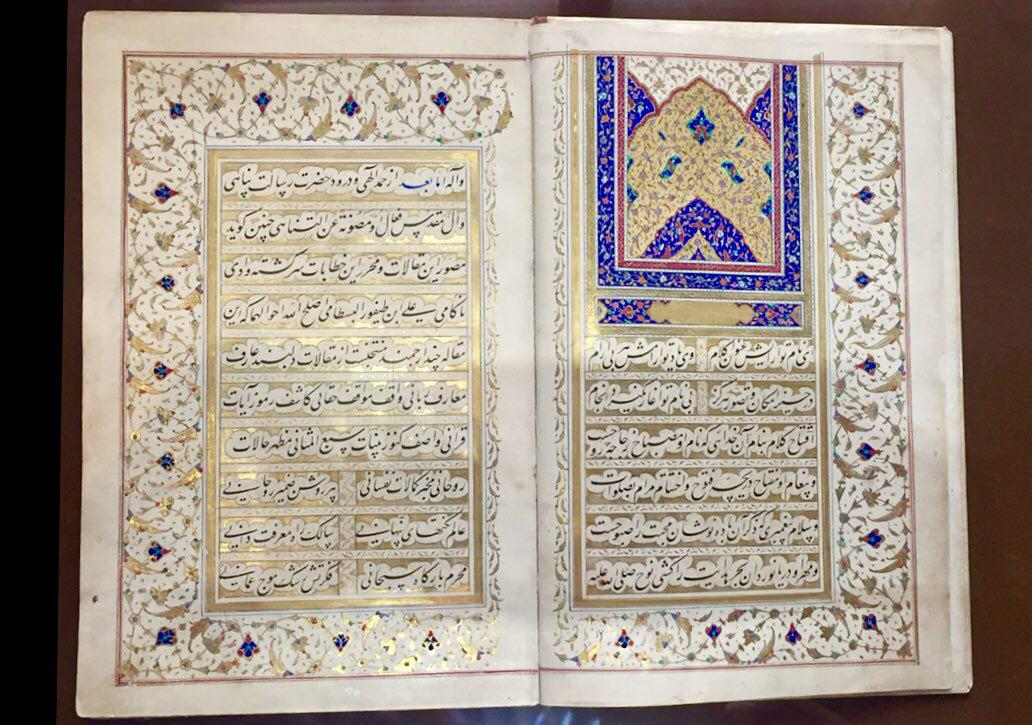 نمونه ای از اثر فتحعلی شیرازی در موزه هنر های اسلامی تهران